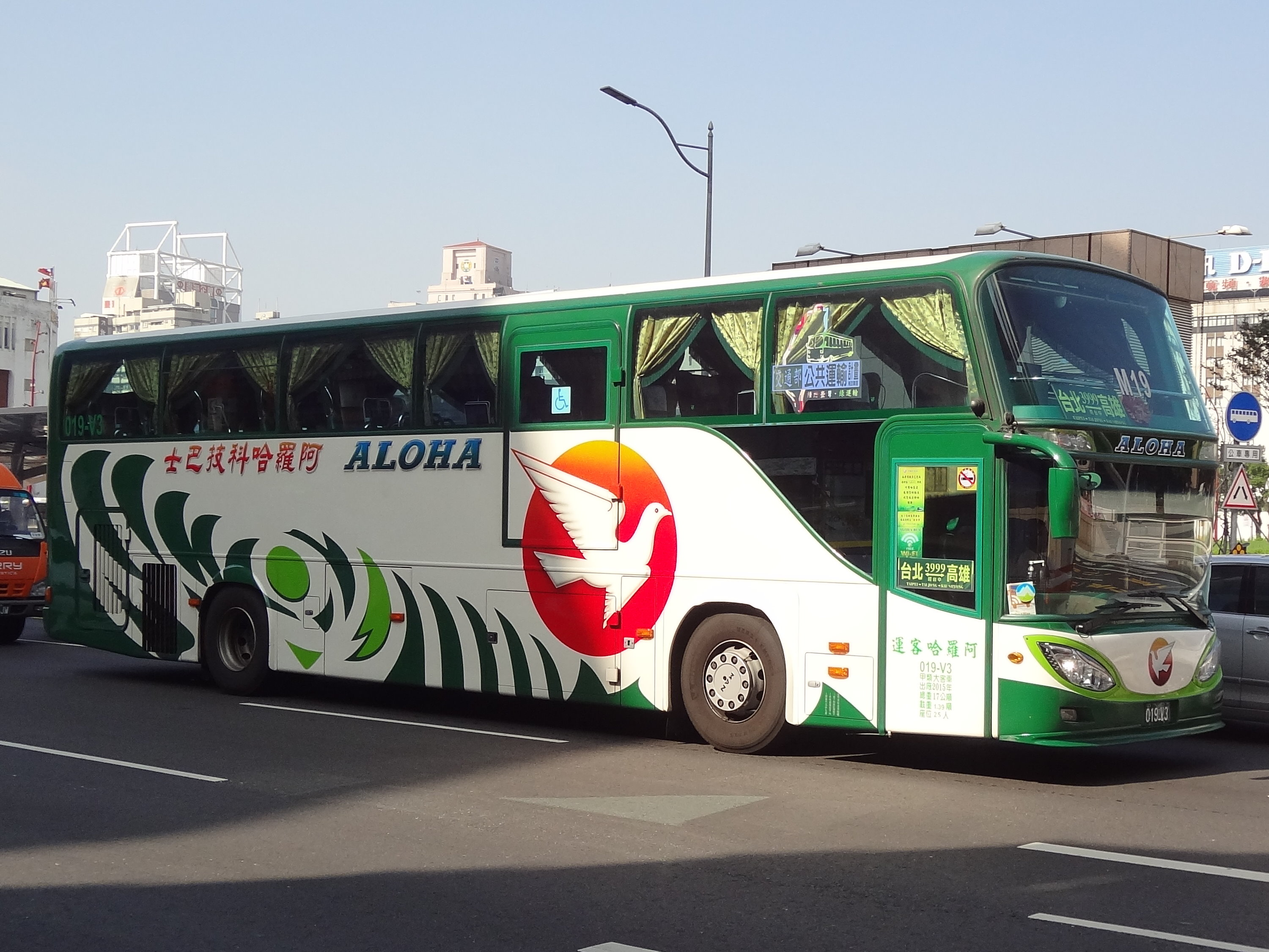 阿羅哈客運2015年大客車019-V3右前方外觀。